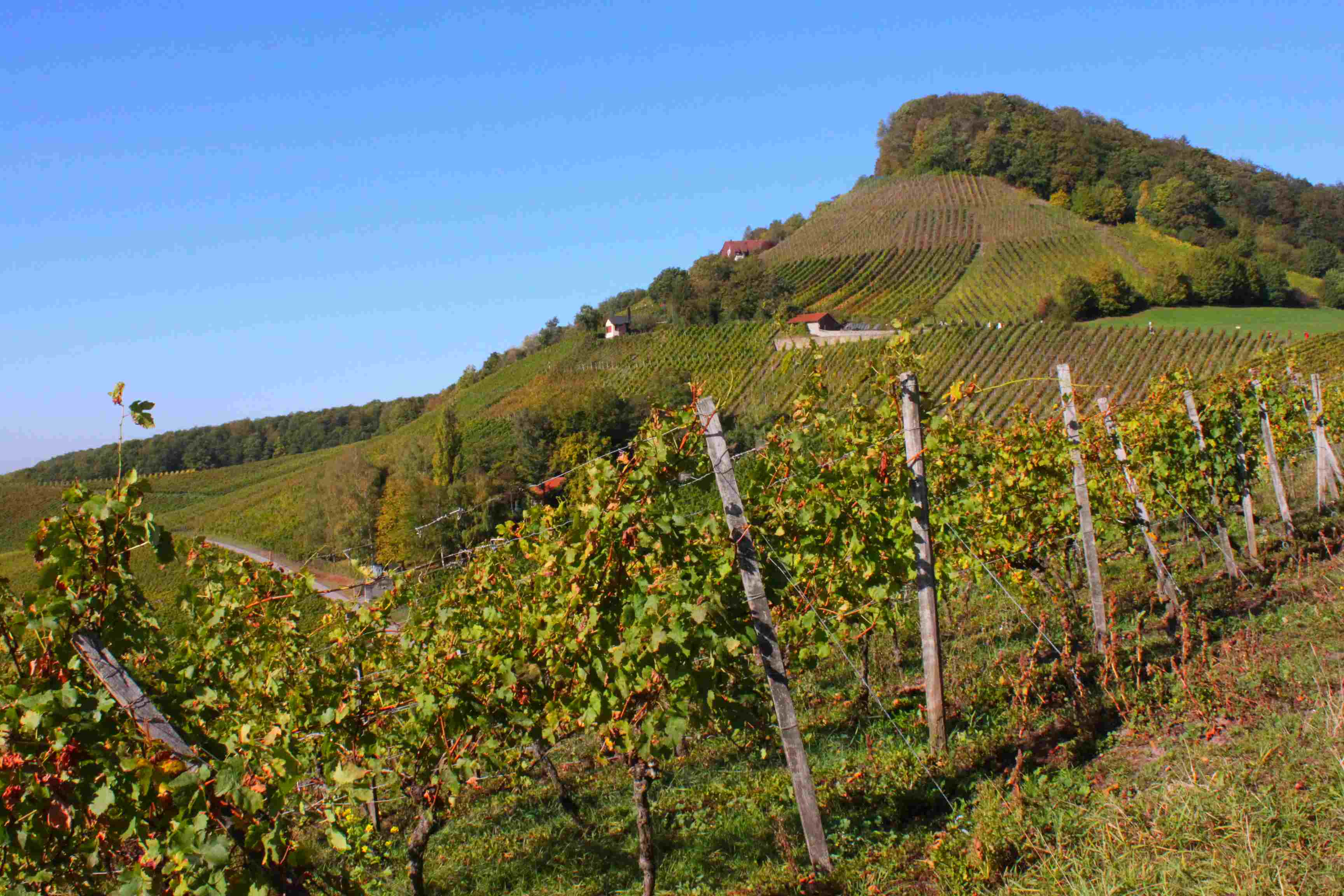 Blick auf den Stollberg